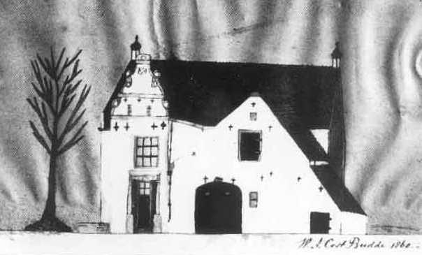 Havezate Borgel te Borgelo, gemeente Diepenveen, nu Deventer. In 1869 afgebrand.